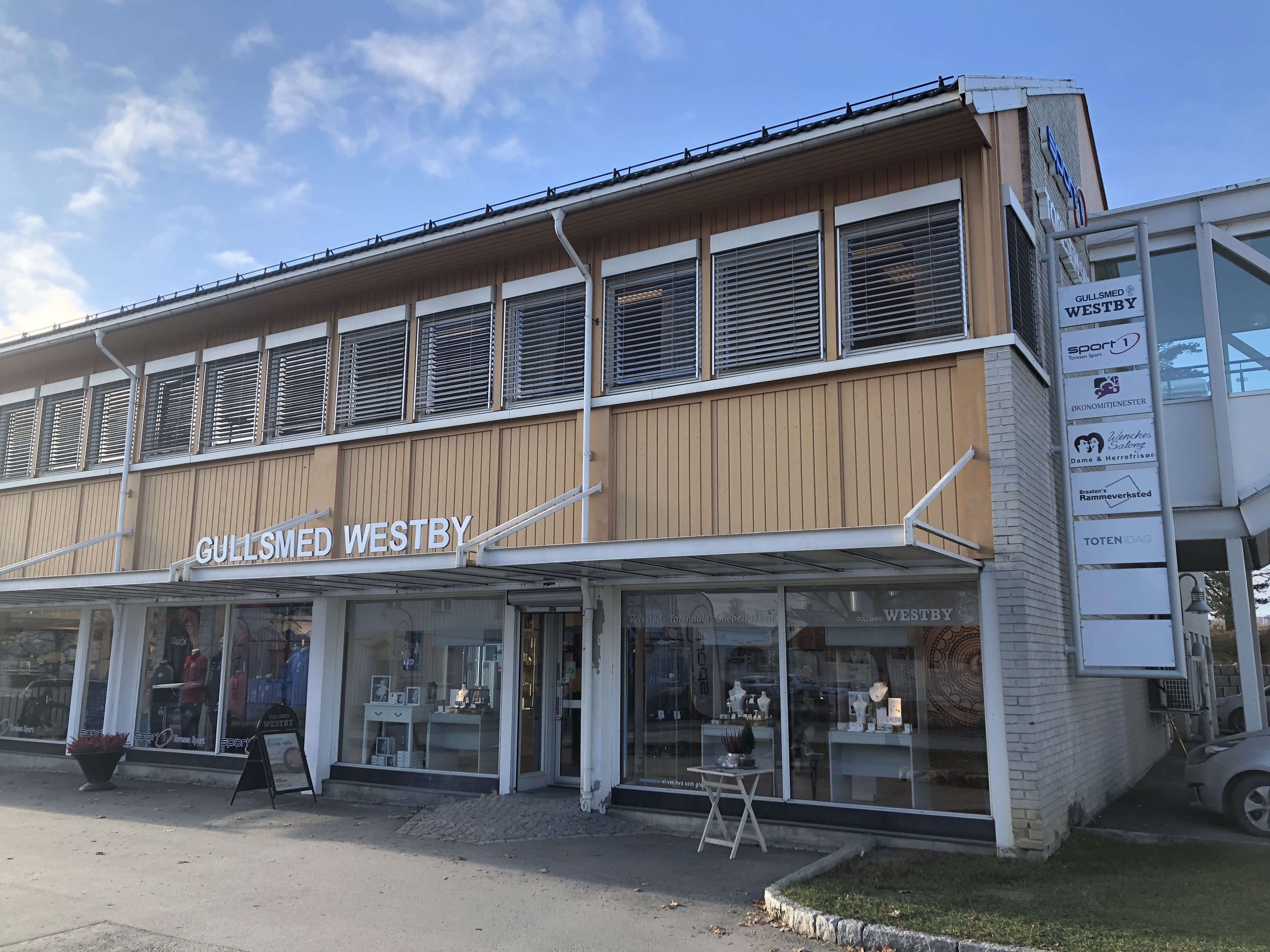 Toten Idag holder til i Audheimgården på Lena i Østre Toten kommune.